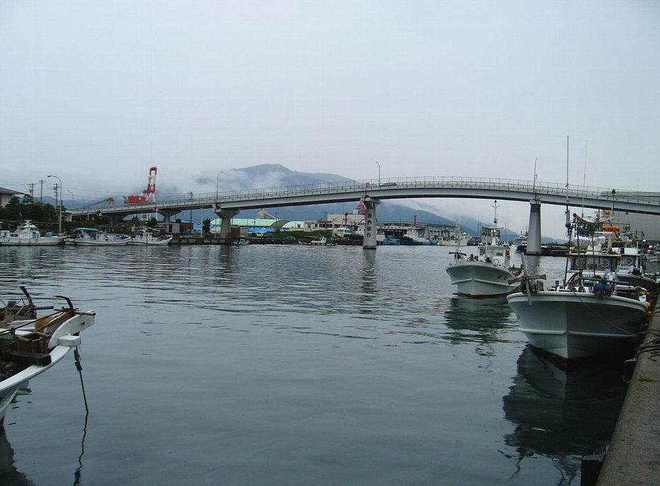 敦賀港 港大橋付近 2006年9月13日 Bakkai撮影 Category:港湾画像